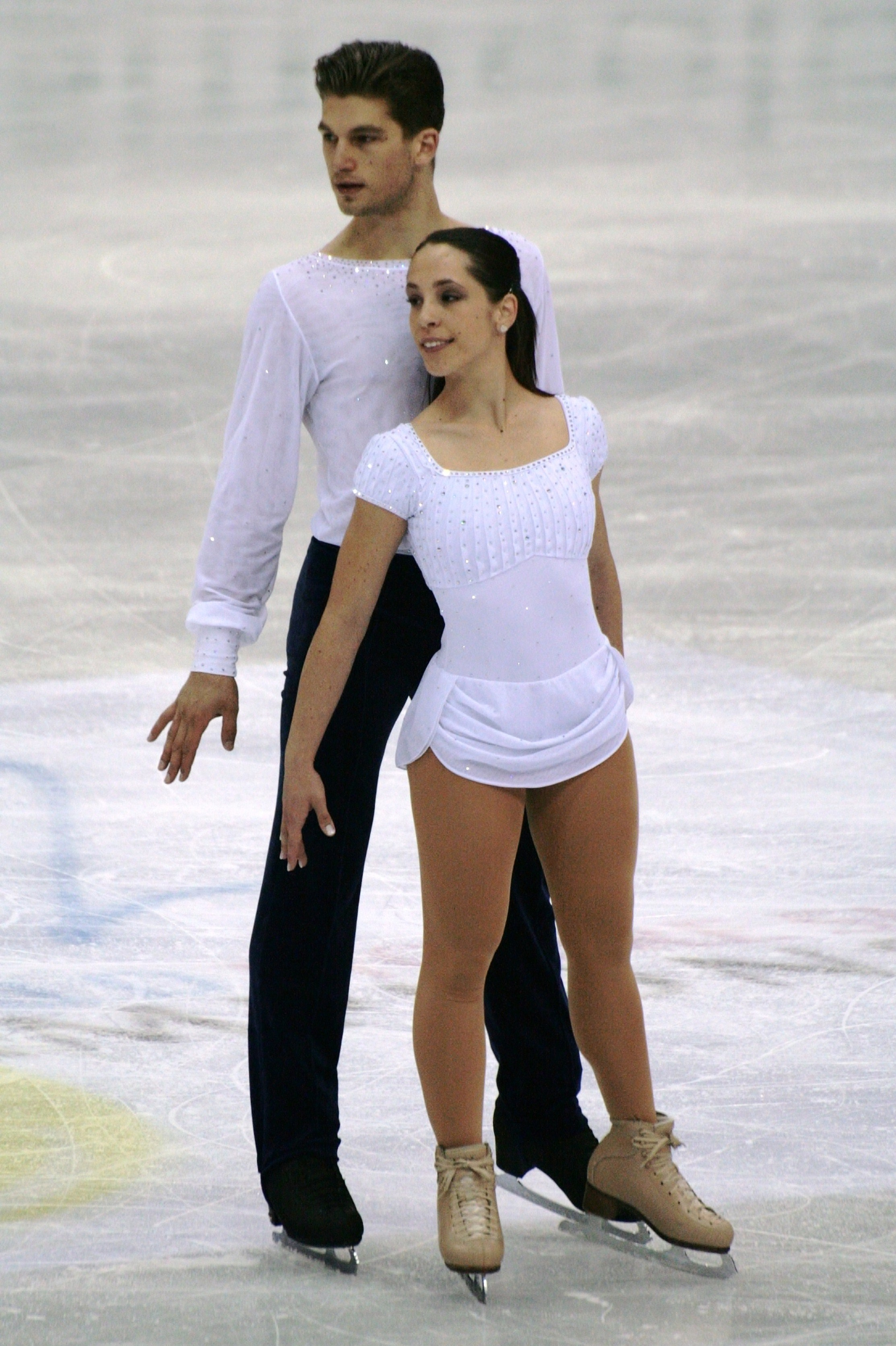 Николь Делла Моника и Маттео Гуаризе на чемпионате мира по фигурному катанию 2012.